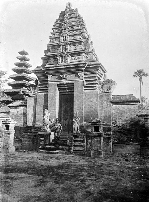 Repronegatief. Poort van een tempelcomplex in Gelgel